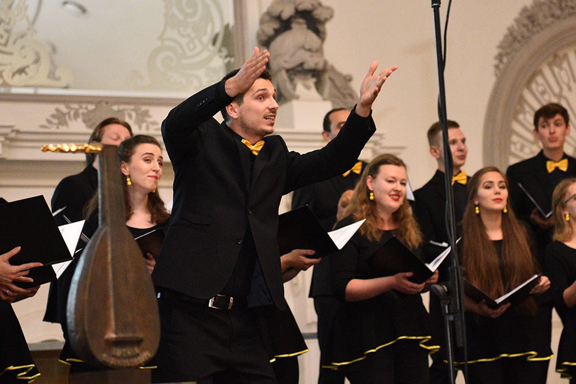 Legnica Cantat 49; rok 2018. Zespół Wokalny Rondo z Wrocławia (dyr. Małgorzata Podzielny), kilkukrotnie nagradzany przez konkursowe jury, podczas koncertu laureata 48. Legnica Cantat w Akademii Rycerskiej.